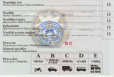 Sürücülük vəsiqəsi (arxa tərəfi)